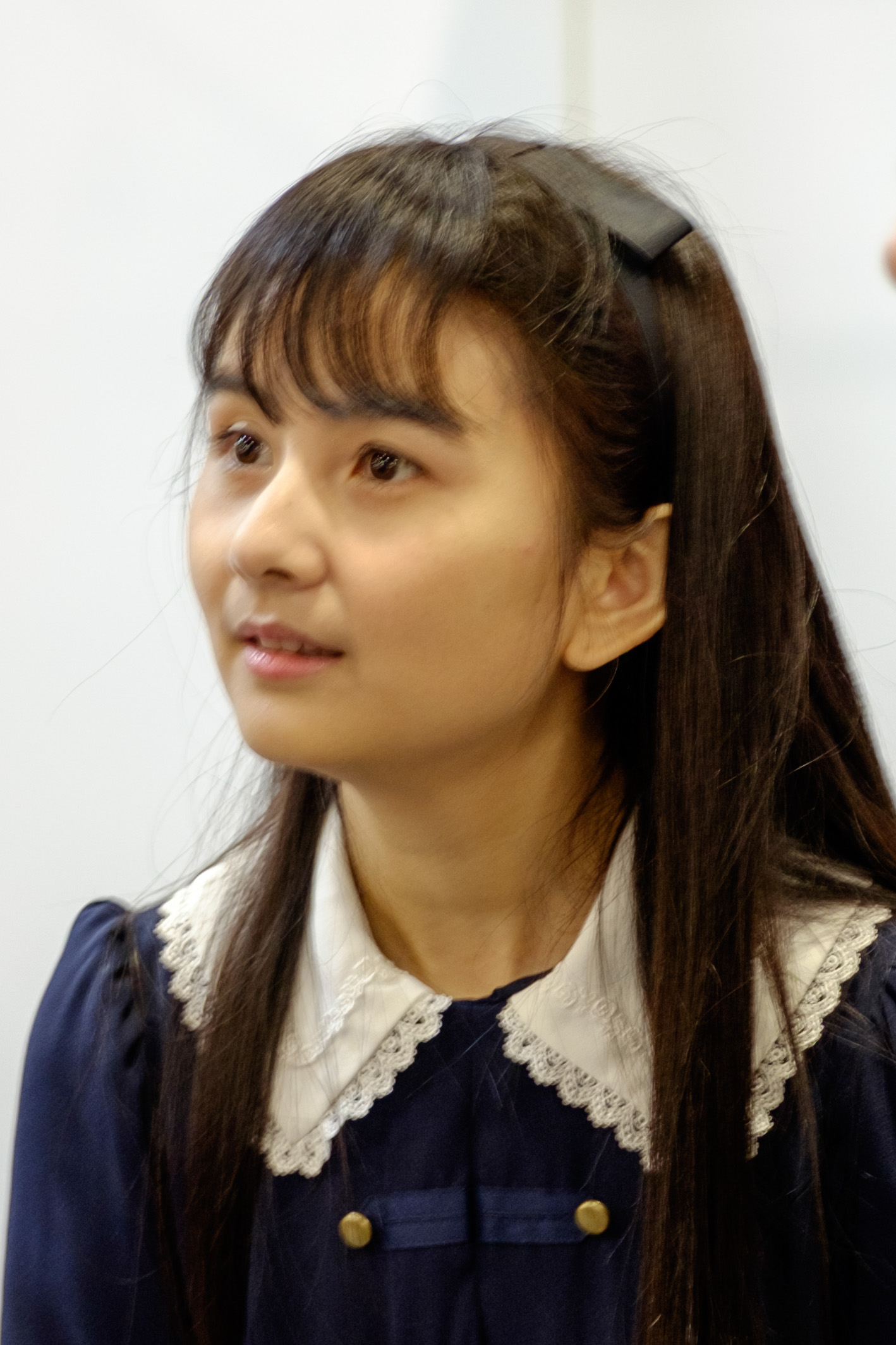 2016臺北國際書展第五日下午，簽名會結束後與會場工作人員交談中的夏達。